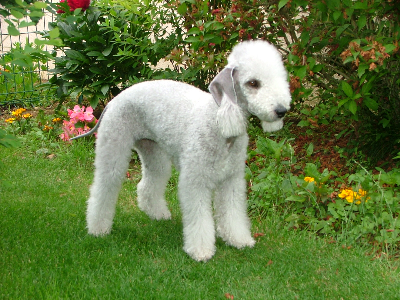 Boutchie, un Bedlington Terrier en janvier 2003.